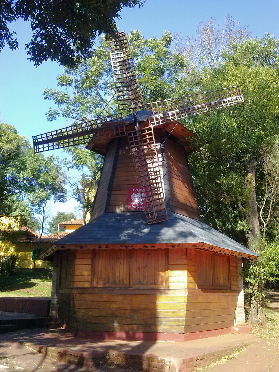 Molino perteneciente a la colectividad polaca de Oberá, Misiones, Argentina.